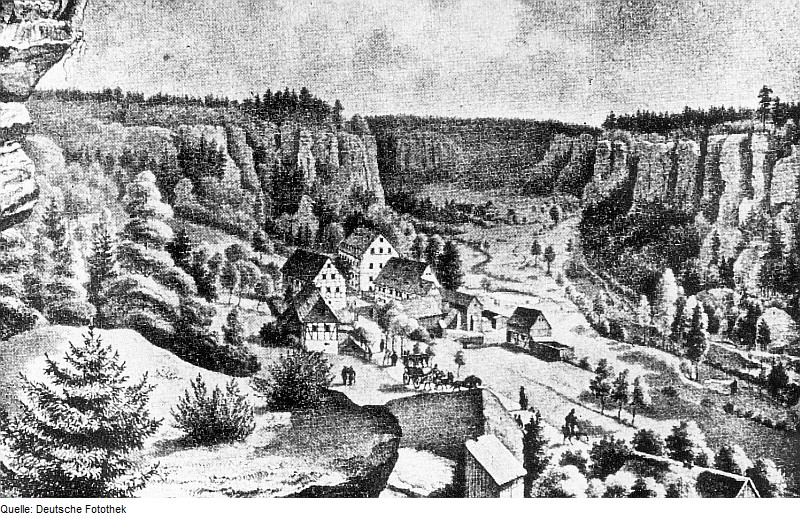 Original image description from the Deutsche Fotothek Rosenthal-Bielatal-Rosenthal. Kaltwasserheilanstalt bei der Schweizer Mühle, Lithographie von H. F. Grünewald, aus: Über Berg und Tal, Nr. 9, 1909